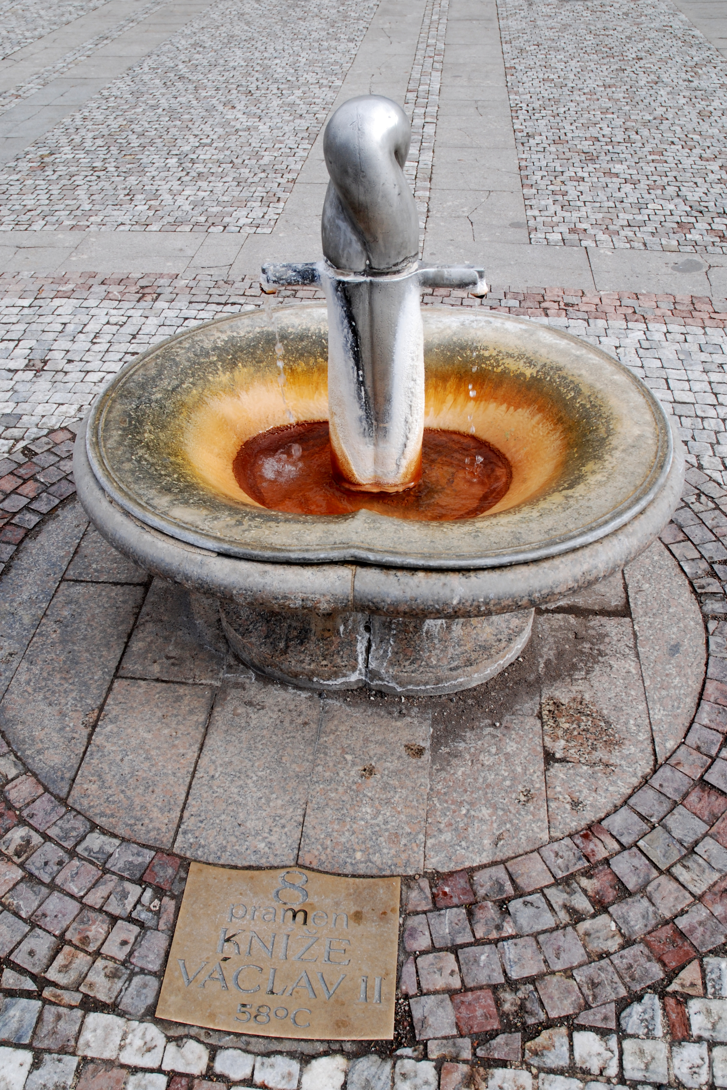 Pramen "Kníže Václav II" před Mlýnskou kolonádou